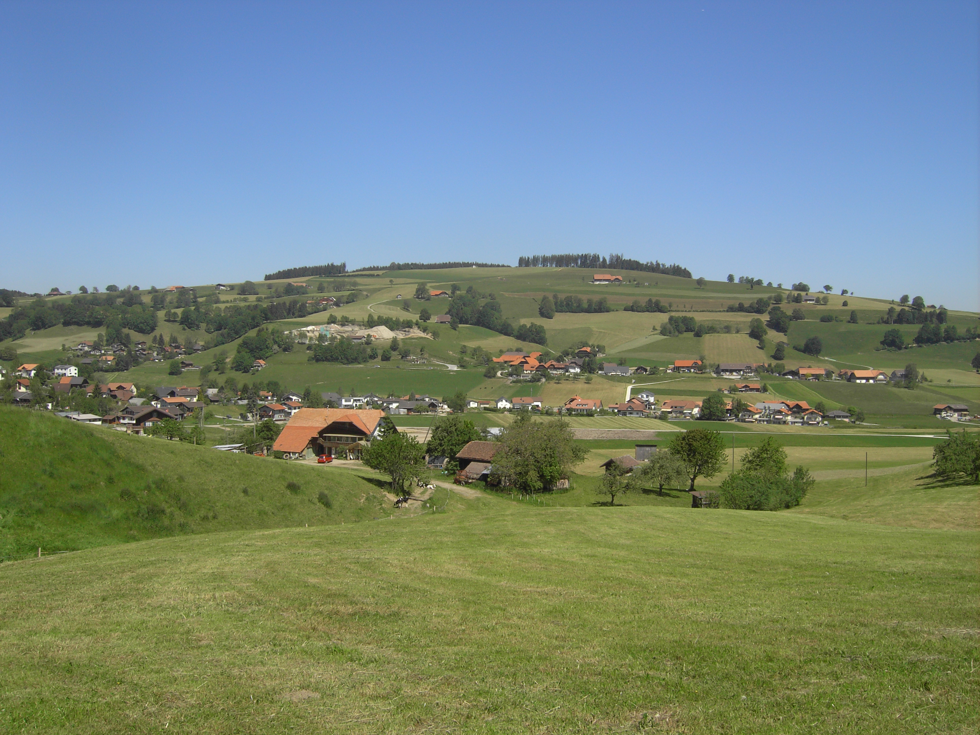 Blick von Süden auf die Gemeinde Oberschrot FR